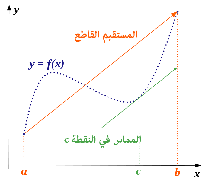 مبرهنة القيمى الوسطى